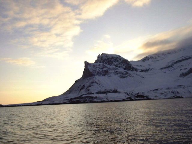 Fjellet Alkhornet ytterst i Isfjorden på Svalbard